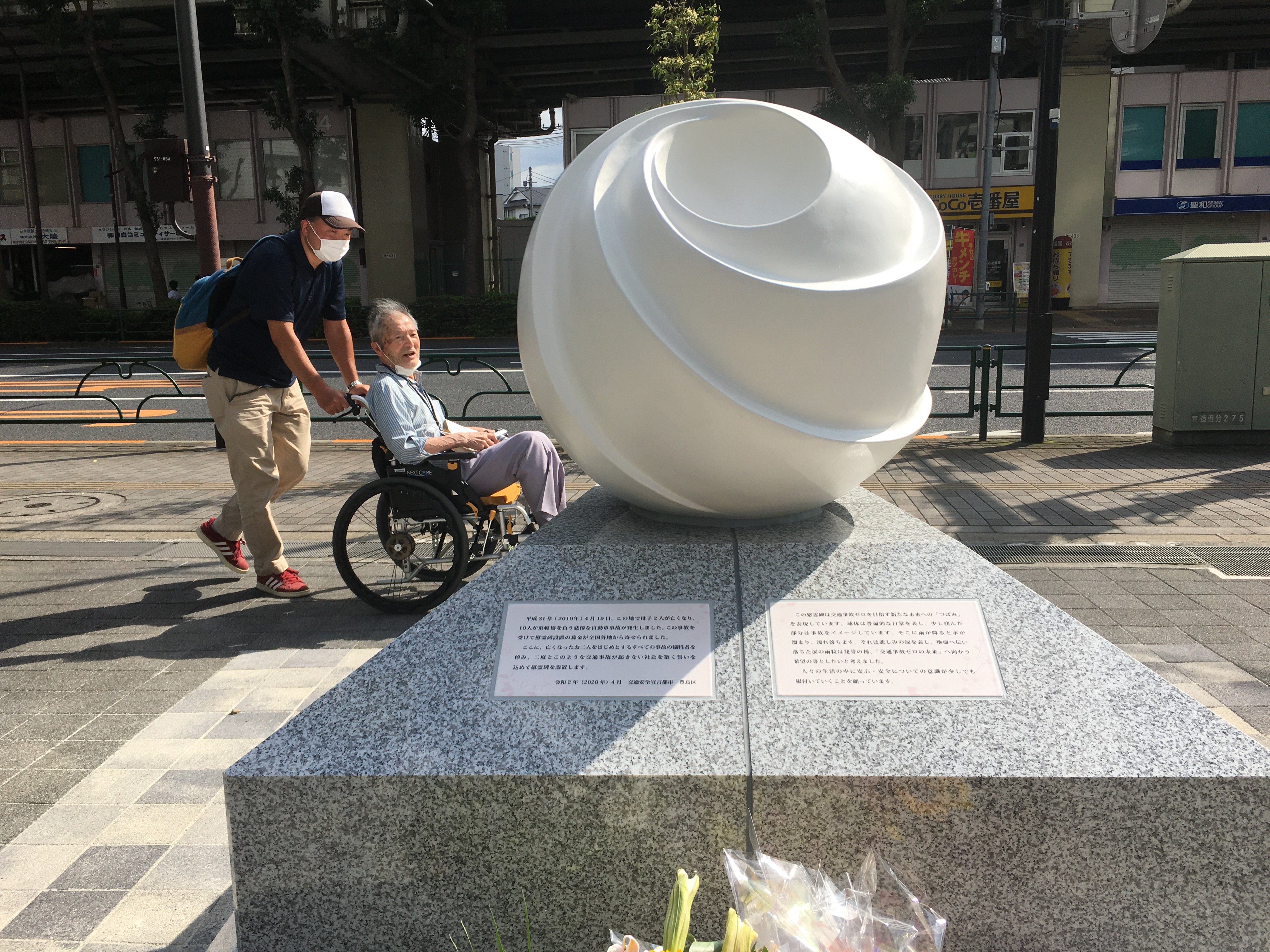 2020年7月11日に除幕された、東池袋乗用車暴走事件の慰霊碑です。7月12日に撮影しました。